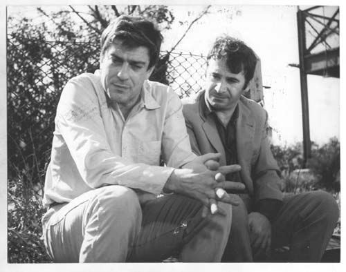 Fotografía blanco y negro sobre papel brillante. Escena en un exteriores donde aparecen sentados Enzo Viena a la izquierda, mirando hacia la izquierda, con los codos apoyados sobre las rodillas y las manos unidas; y Juan Carlos Altavista a la derecha, con las manos unidas, mirando hacia la izquierda. Viena viste camisa y pantalón y Altavista camisa, saco y pantalón.